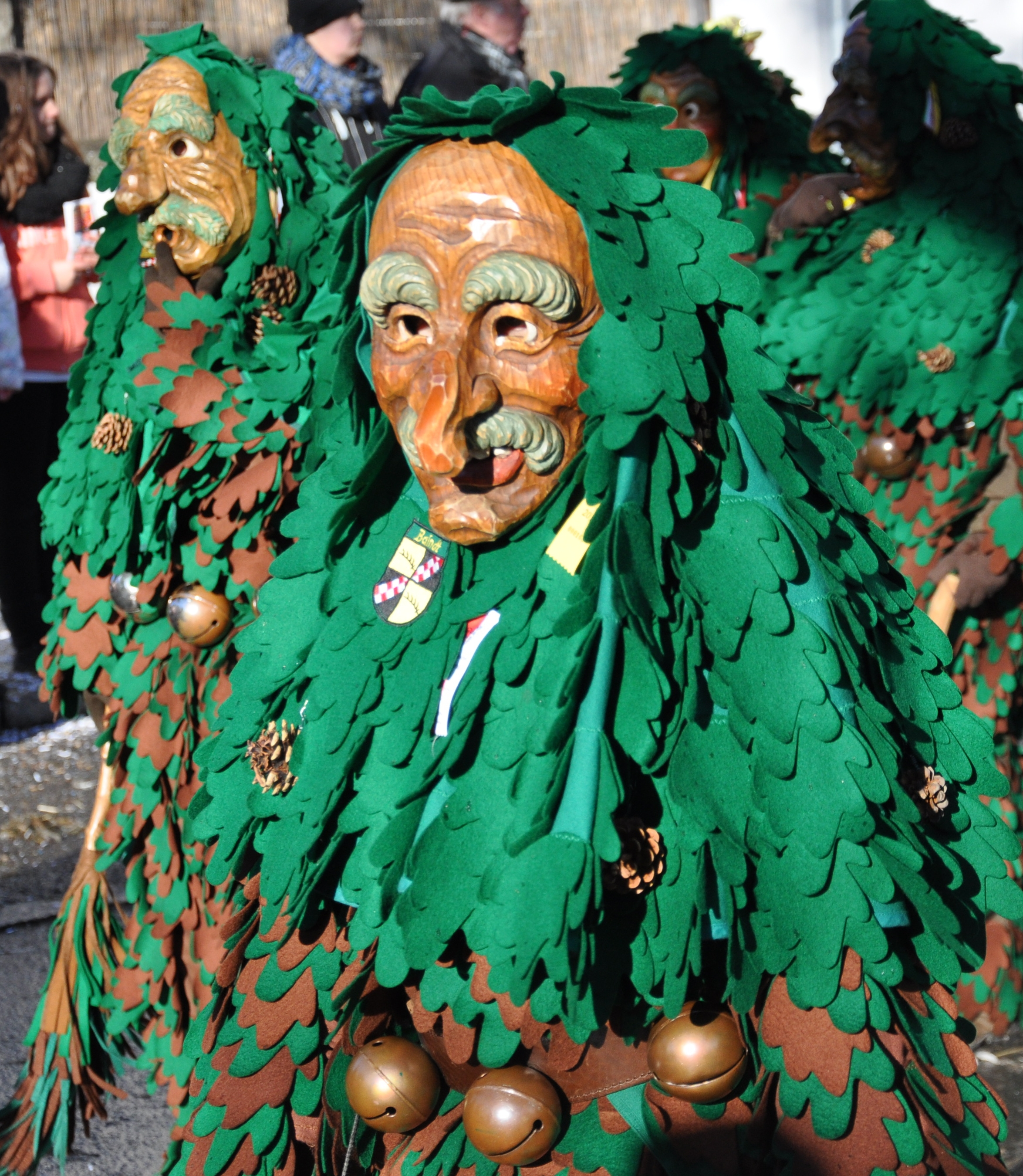 Narrenzunft Raspler Baindt; Narrenfigur: Waldschrat Fotografiert beim Ringtreffen des Alemannischen Narrenrings (ANR) 2014 in Weingarten; Narrensprung am 9. Februar 2014